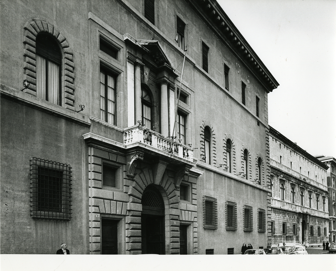 Servizio fotografico : Roma, 1979 / Paolo Monti. - Stampe: 4 : Positivo b/n, gelatina bromuro d'argento/ carta, 24x30. - ((Al verso delle stampe manoscritto numero di negativo corrispondente: 3202, 3202/10, 3202/20, 3202/26. Sul coperchio della scatola manoscritto a pennarello nero: "Roma". - Occasione: Documentazione per la ubblicazione: " Fumagalli, Alberto "Mirabilia Romae: il centro storico nell'arte attraverso i secoli", Milano Cariplo 1979. - Fonte: Agenda di Paolo Monti: Nikon Leika 3001-/ Monti 1978 (1978-1982), presso Archivio Paolo Monti. - Fonte: Fattura di Paolo Monti: IV. Commesse/ Fattura n. 17/ Fotografie centro storico di Roma per Cariplo (1979/06/11), presso Archivio Paolo Monti. - Fonte: Monografia di Fumagalli, Alberto: Mirabilia Romae: il centro storico nell'arte attraverso i secoli, Milano, Cariplo (1979)